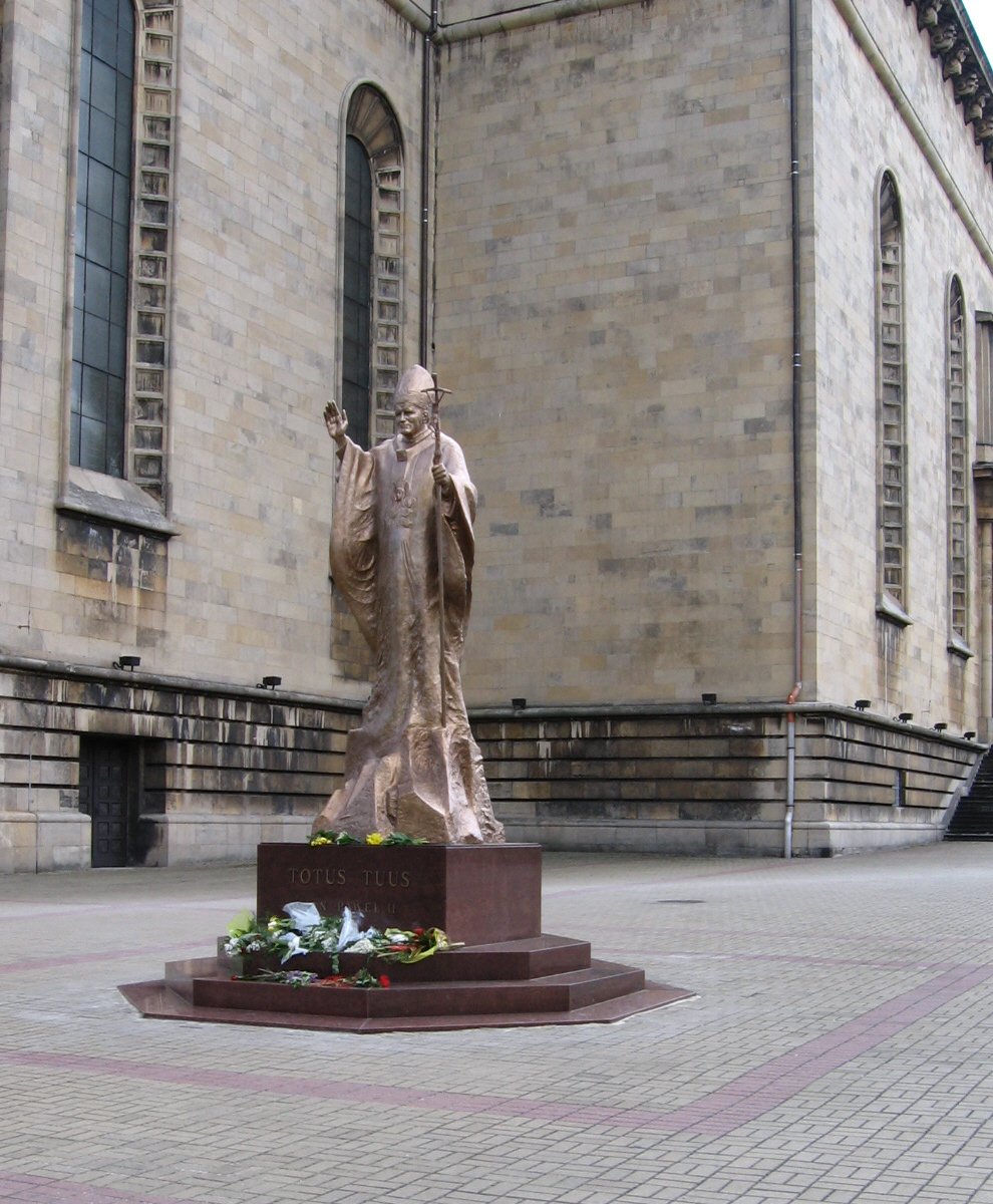 Pomnik pap. Jana Pawla II w Katowicach, art. rzeźbiarz Zemła